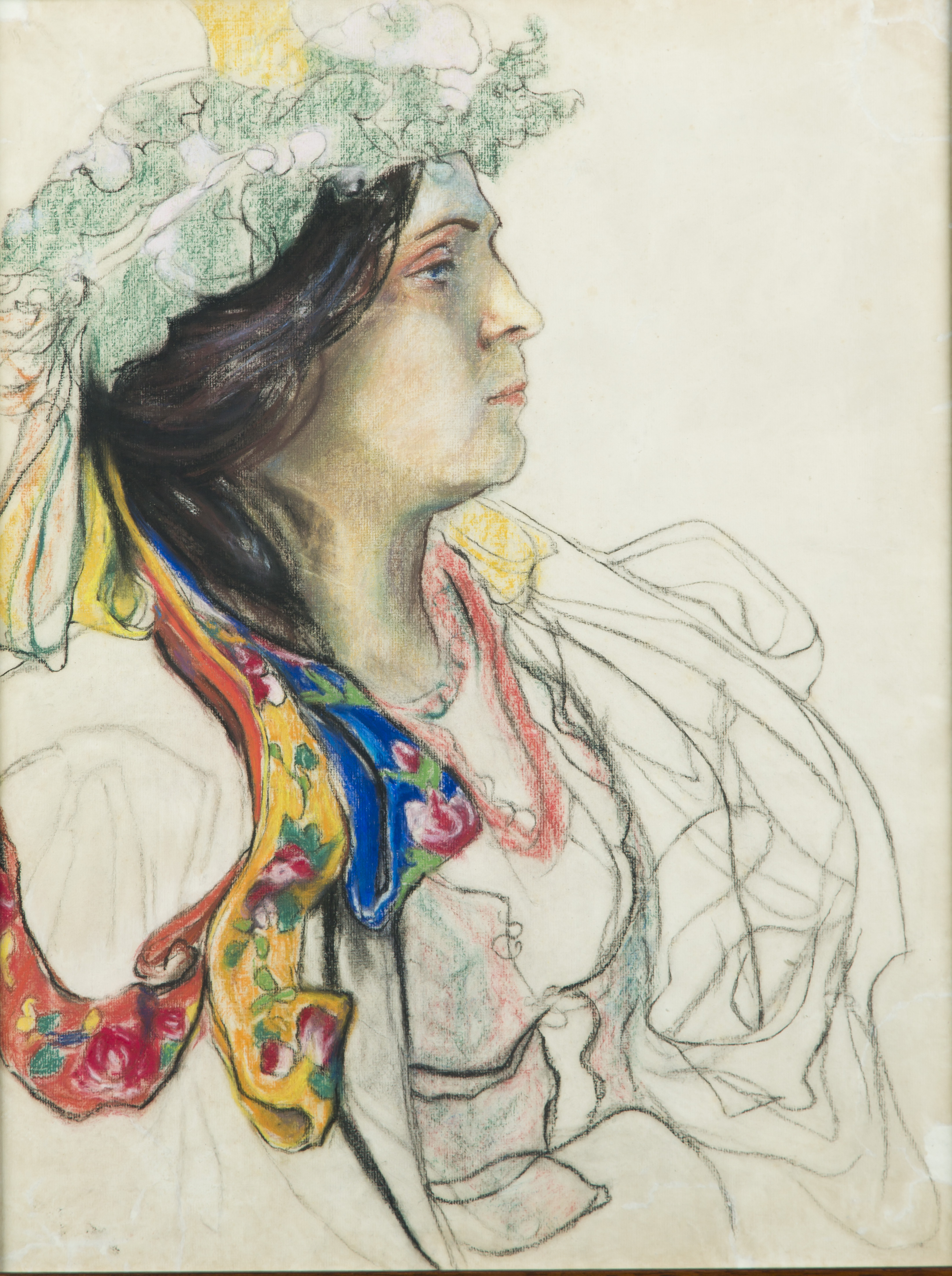 obrazy Stanisława Wyspiańskiego "Portret Wandy Siemaszkowej" - ze zbiorów Muzeum Górnośląskiego w Bytomiu